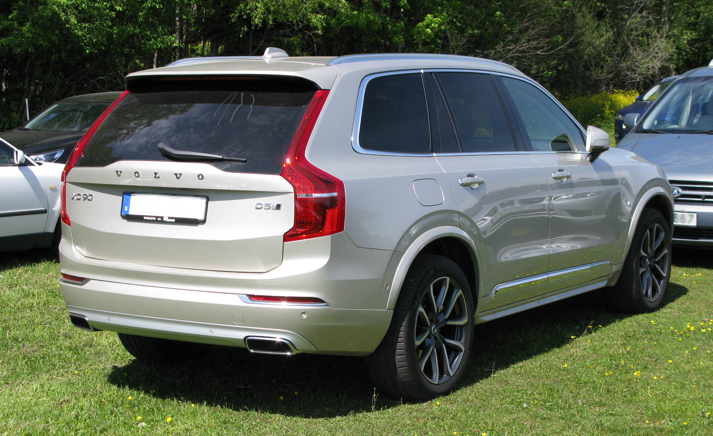 2015 Volvo XC90 Inscription